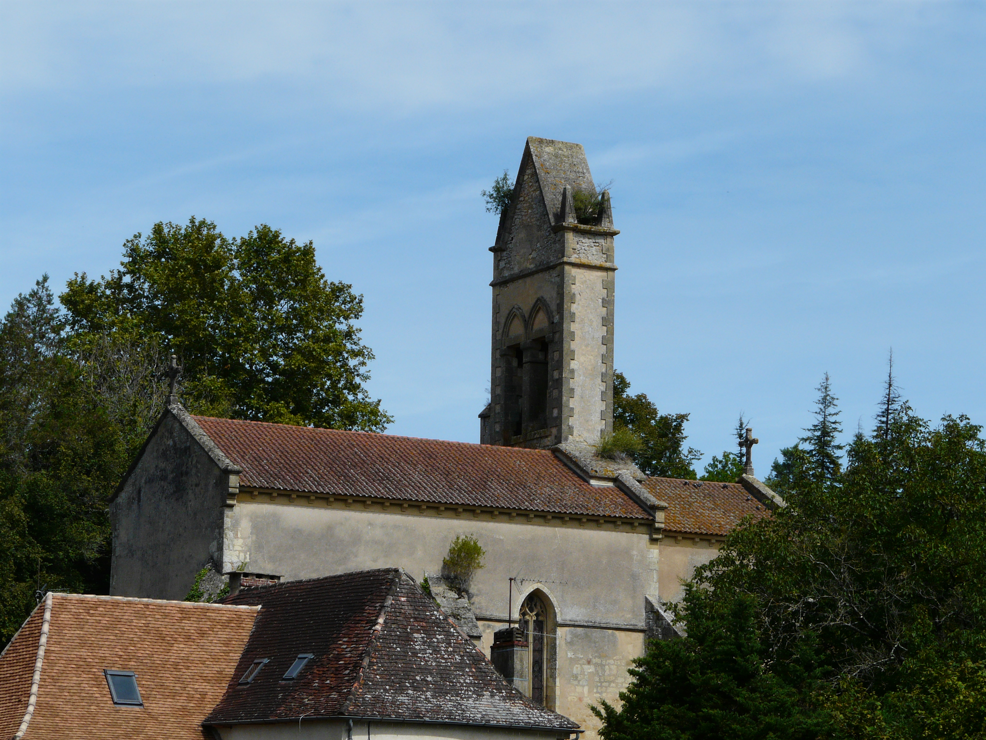 L'église Saint-Marcel, Saint-Marcel-du-Périgord, Dordogne, France